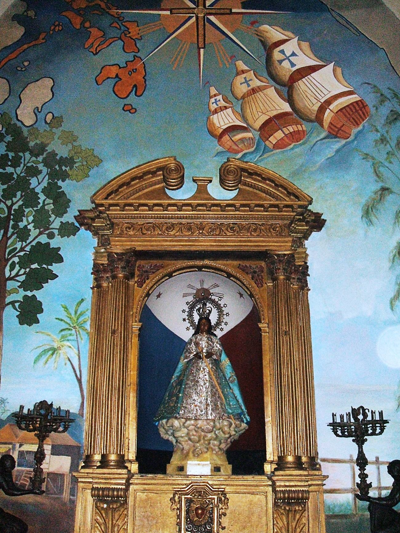 Retablo de Nuestra Señora de la Paz y Buen Viaje de Antipolo, Basílica Menor y Santuario Nacional de la Gran Promesa, en Valladolid, España/Spain